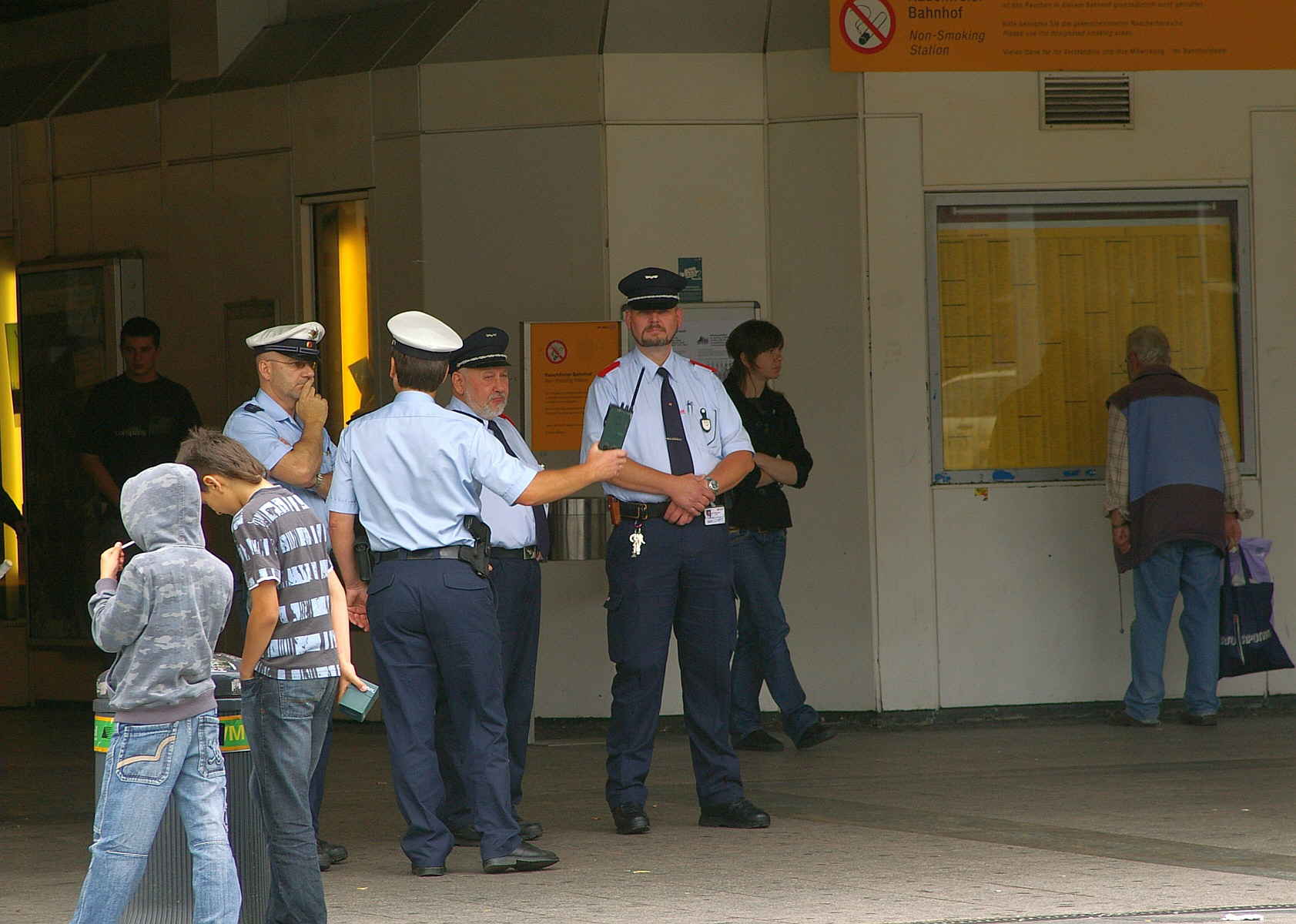 Bundespolizisten (links) und DB-Sicherheitsdienst (rechts) in Dortmund